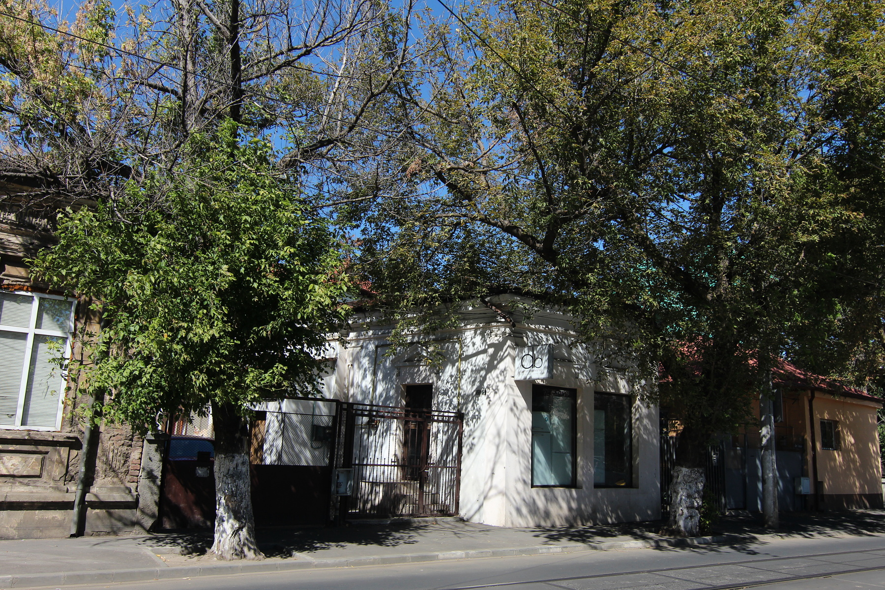 Casă pe strada Traian